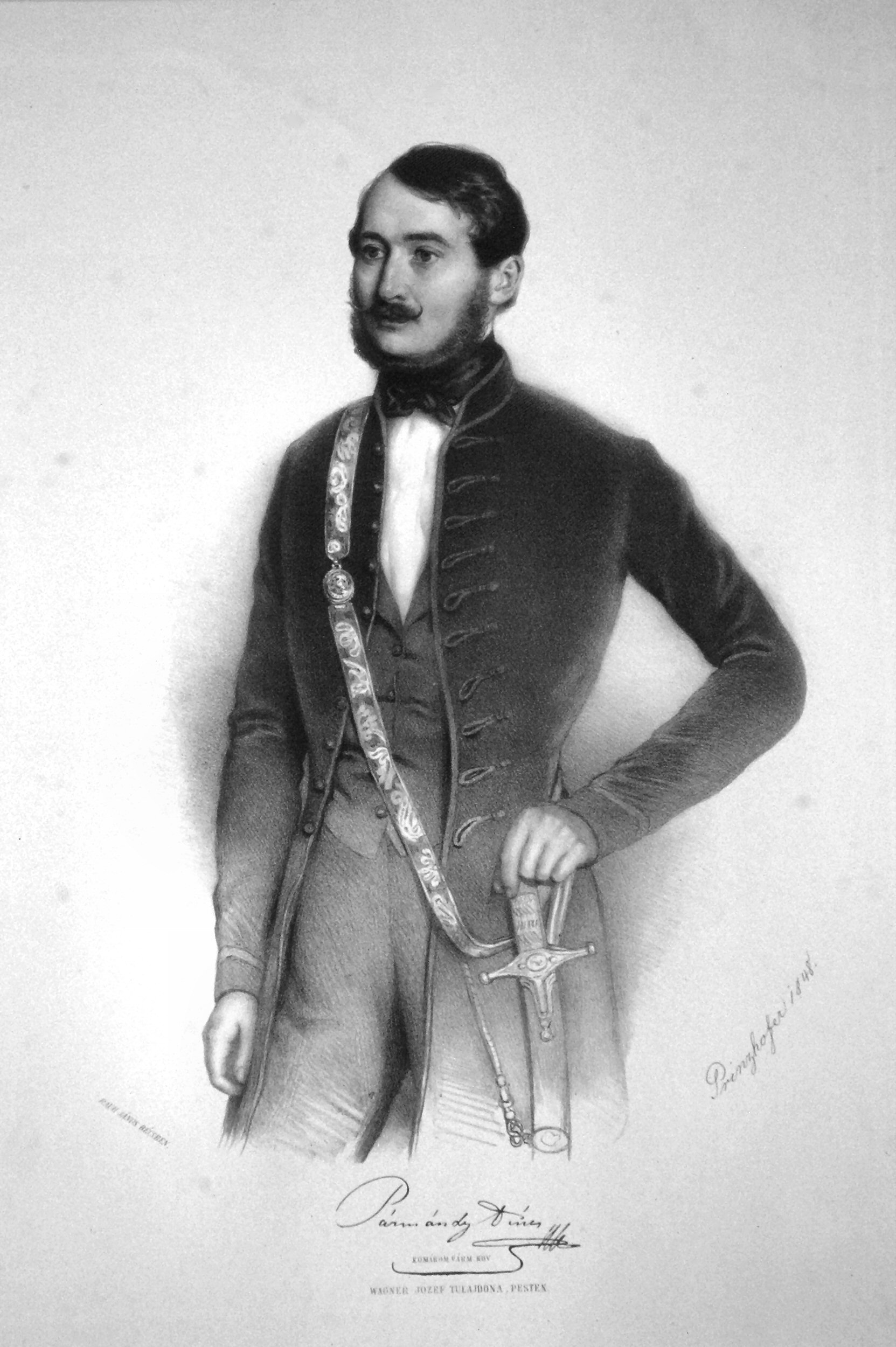 Dénes Pázmándy (1816-1856), ungarischer Abgeordneter. Lithographie von August Prinzhofer, 1848